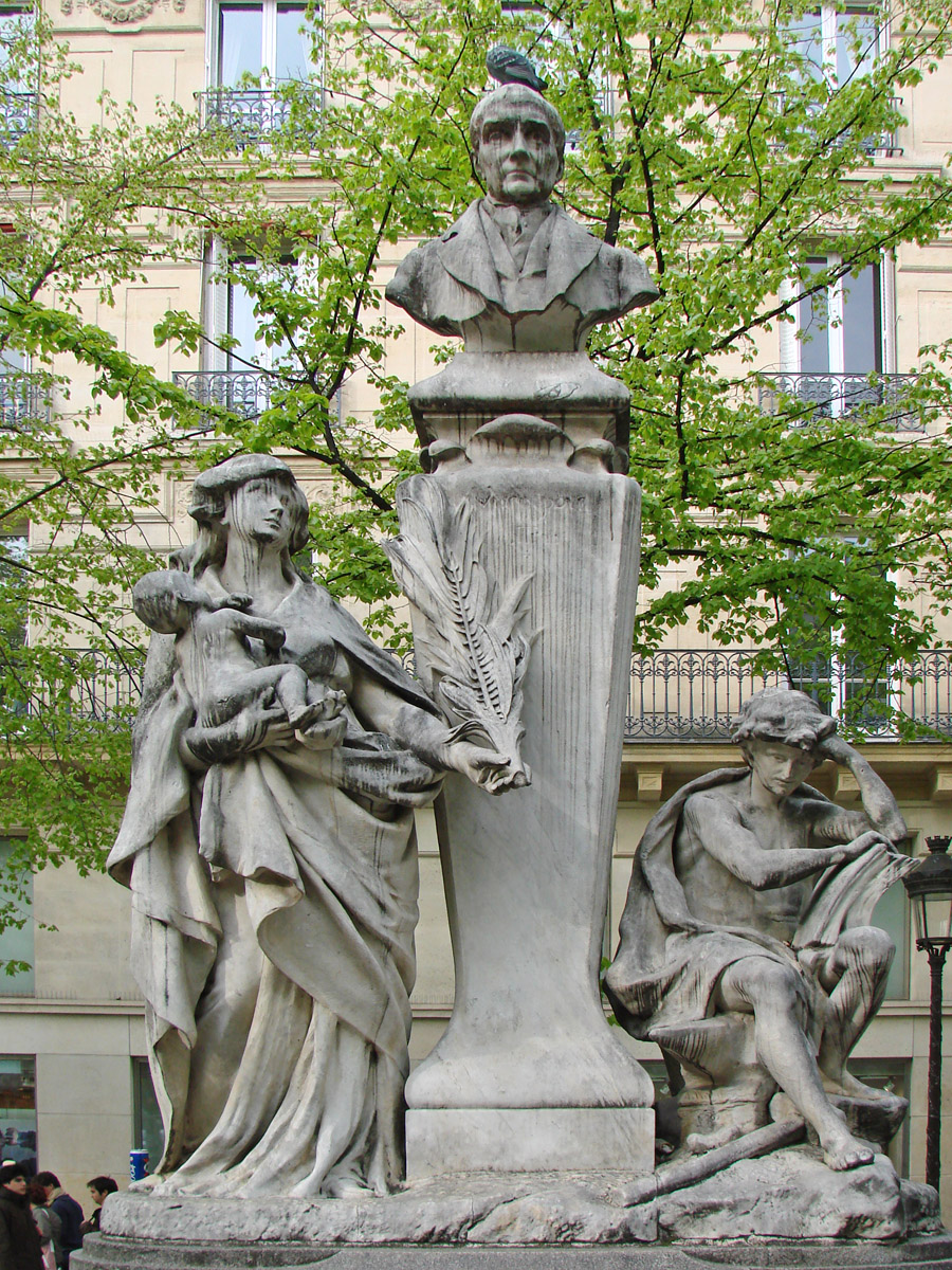 Monument à Auguste Comte, situé place de la Sorbonne à Paris et inauguré en 1902. Sculpture de Jean-Antoine Injalbert. Au centre, le buste du philosophe; à gauche, Clotilde de Vaux en "madone à l'enfant"; à droite, le prolétaire en train de s'instruire. Dans la Religion de l'Humanité, imaginée par Auguste Comte entre 1845 et 1848, Clotilde de Vaux a été transformée en symbole, selon les modèles du Catholicisme romain. Les sacrements de la Religion de l'Humanité sont : la Présentation, l'Initiation, l'Admission, la Destination, la Maturité, la Retraite, l'Incorporation.